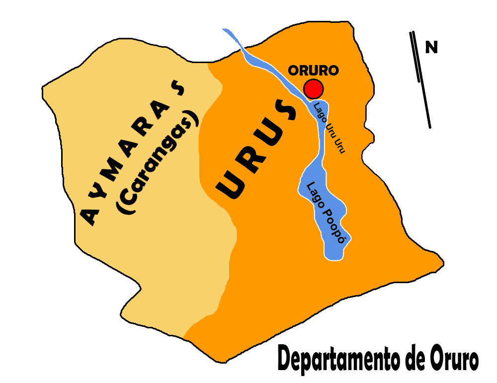 Mapa de la invasion de los aymaras en territorio de los urus del departamento de Oruro, bolivia